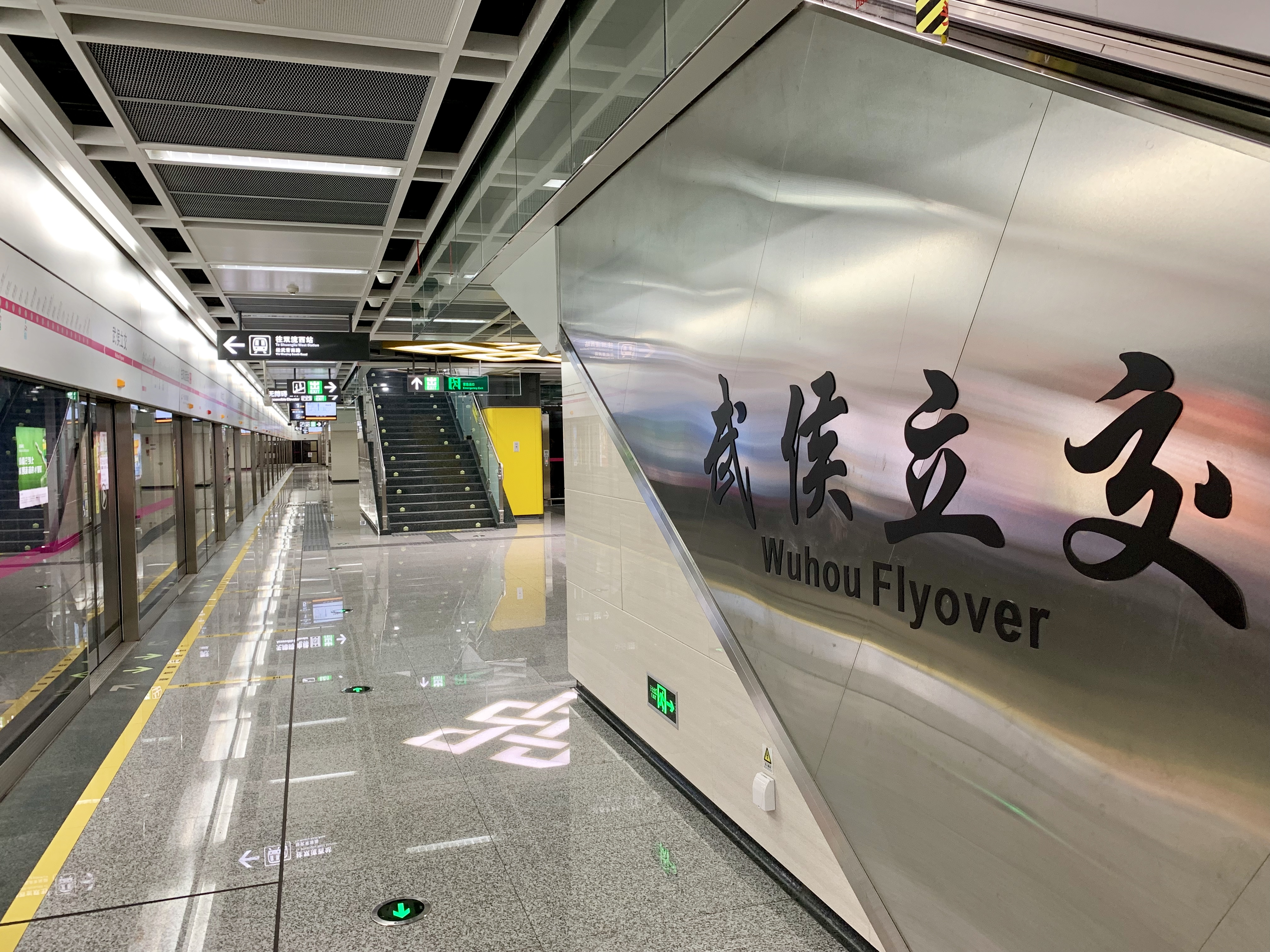 成都地铁武侯立交站